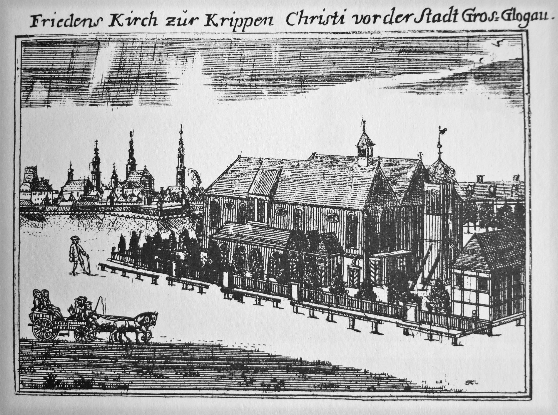 Zweite Friedenskirche in Glogau "Zur Krippen Christi" (Schlesien) aus Friedrich Bernhard Werner: Schlesische Bethäuser (1748-52)